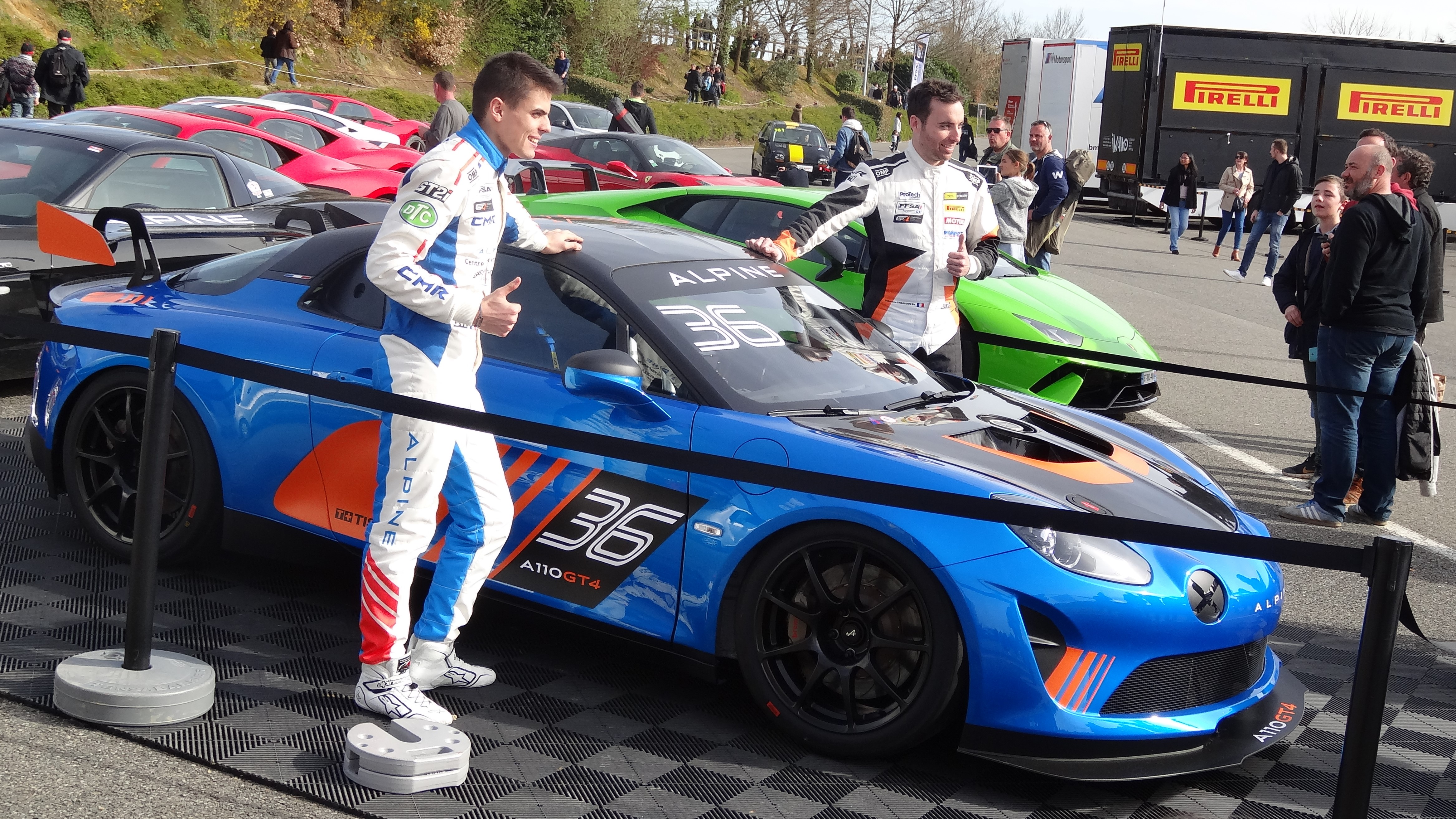 51e Coupes de Pâques (sport automobile), sur le Circuit Paul Armagnac à Nogaro (Gers) : Alpine GT4.